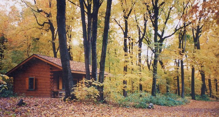 Baker Near-Wilderness Settlement, Baker Park Reserve, Maple Plain, MN, USA.